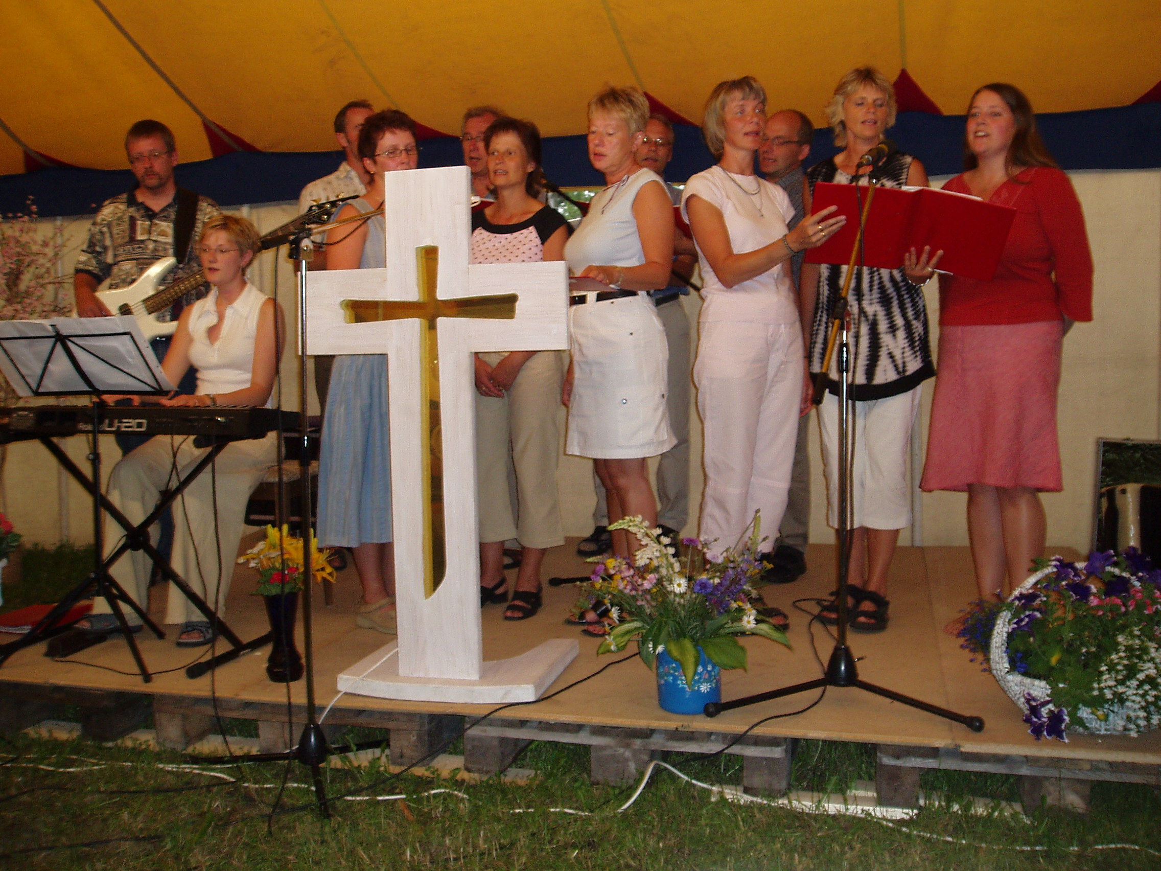 Kören Sångarna under ett tältmötesarragemang i Ljustorp